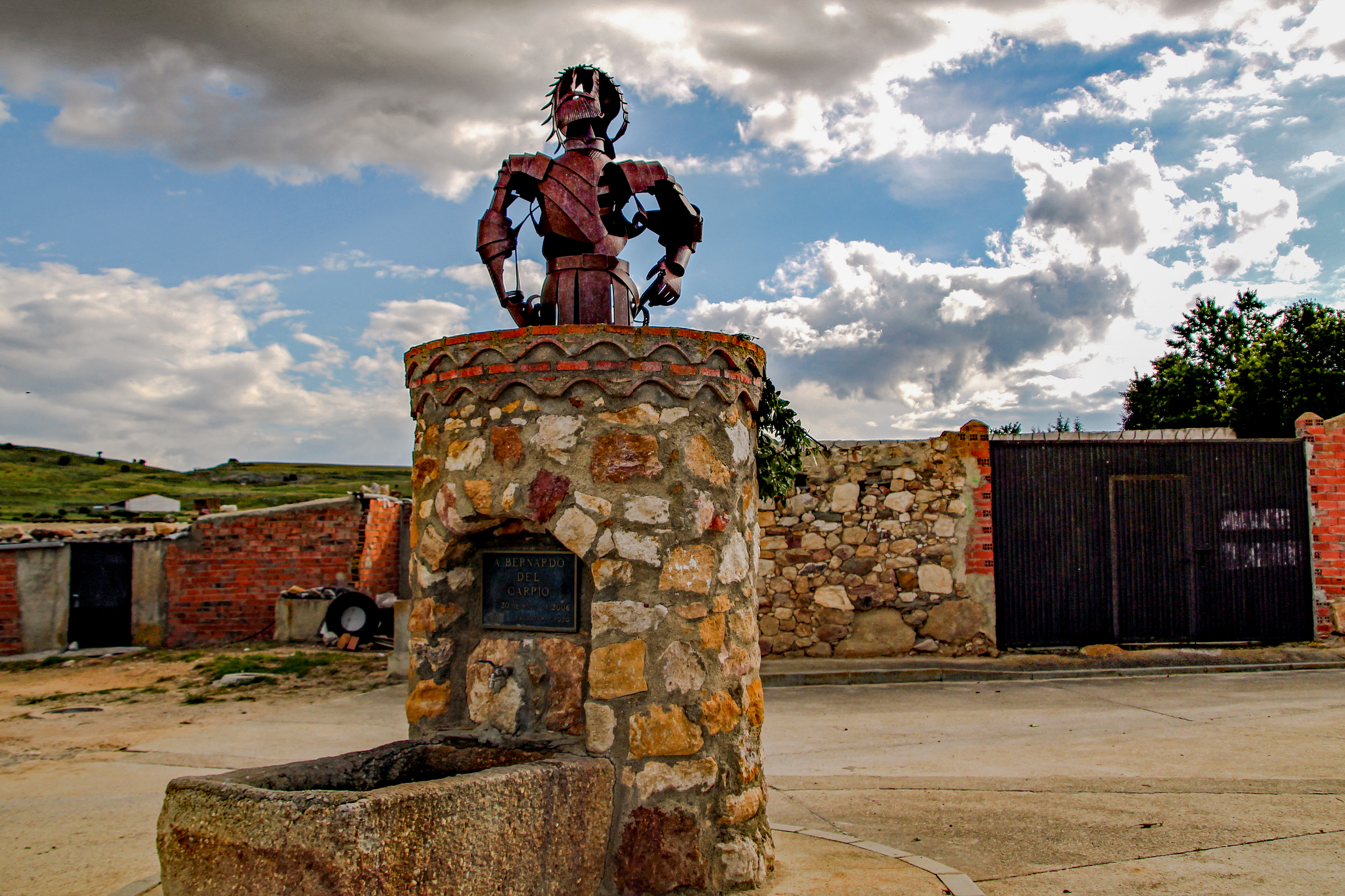 Carpio-Bernardo es una localidad del municipio de Villagonzalo de Tormes, comarca de Campo de Salamanca, en la provincia de Salamanca.